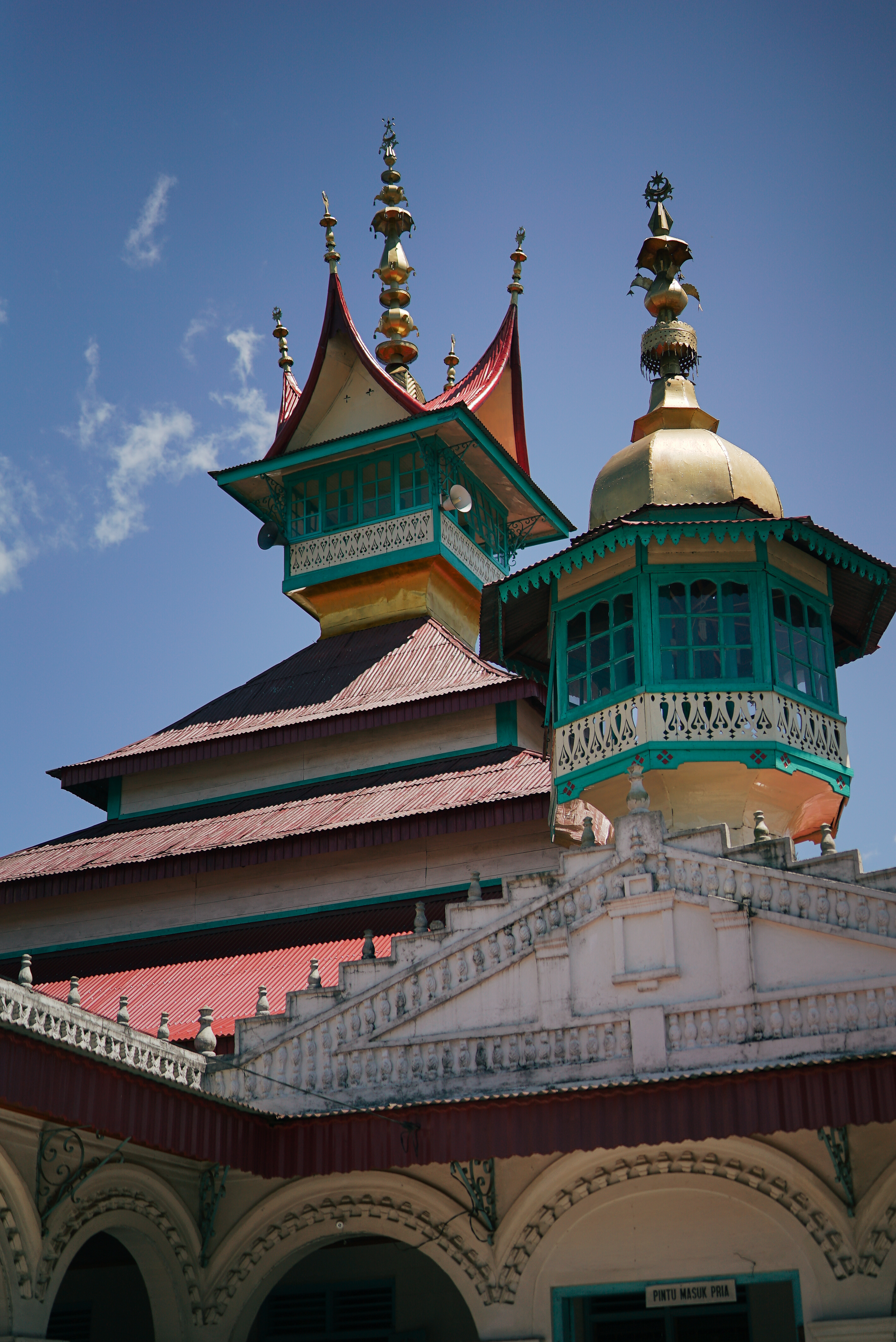 Beridiri tahun 1922 menjadikannya salah satu masjid tertua di Indonesia. Langgam bangunannya perpaduan antara arsitektur Minangkabau dengan Persia. Lokasi : Nagari Koto Baru, Solok Selatan, Sumatera Barat